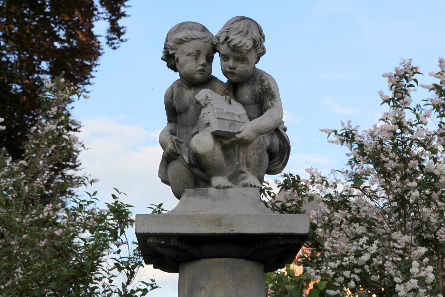 Detail der Gedenksäule für die ab 1920 erbaute Eigenheimsiedlung des Spar- und Bauvereins Radeberg